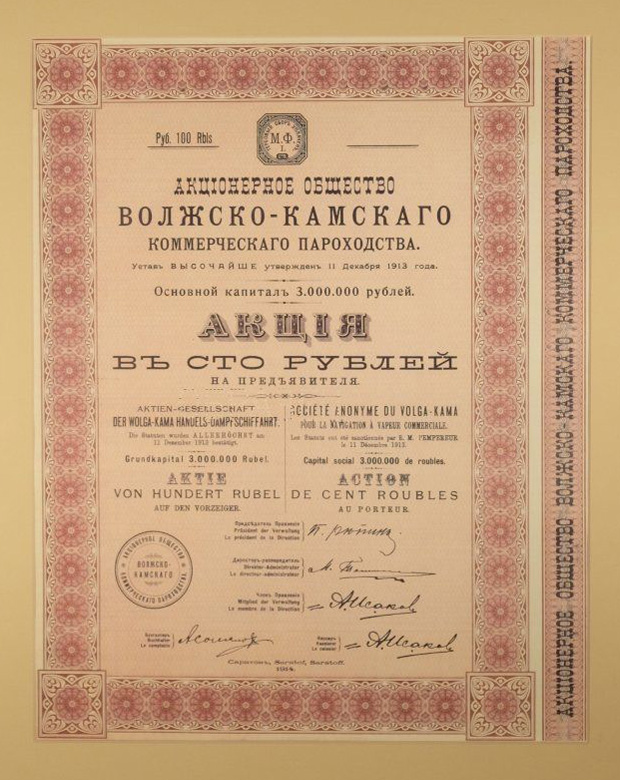 Акции Волжско-Камского коммерческого пароходства